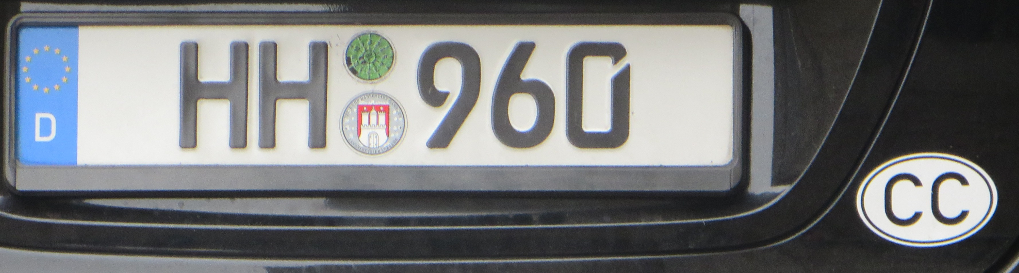 Hamburg CC kentekenplaat